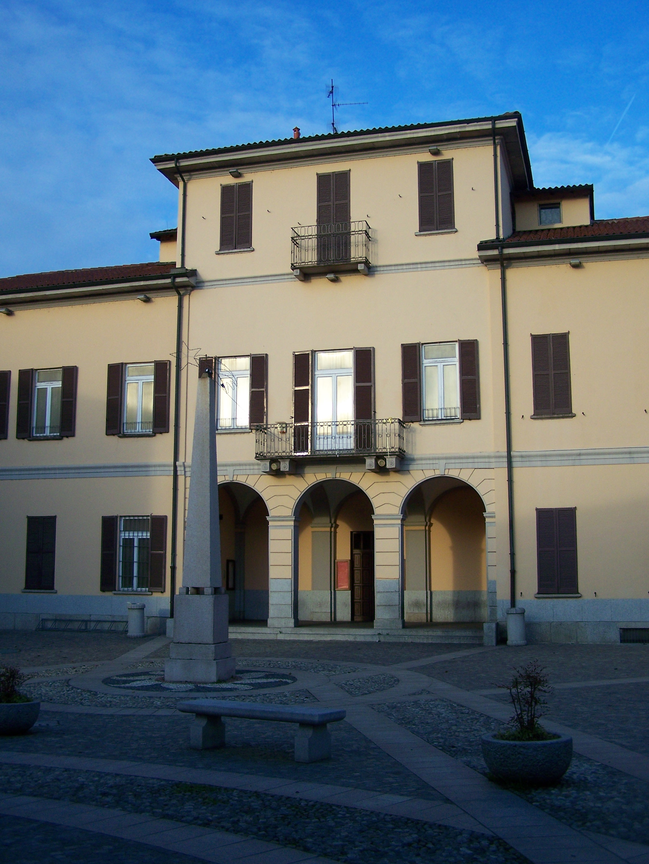 Villa Calderari a Boffalora sopra Ticino